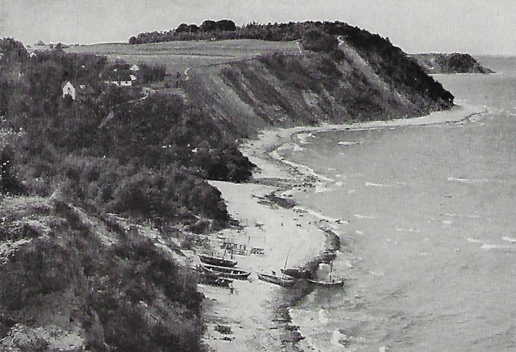 Wachbudenberg an der Nordwestecke des Samlandes bei Groß Kuhren